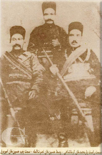 Фотография Мохаммад Хана Керманшахи